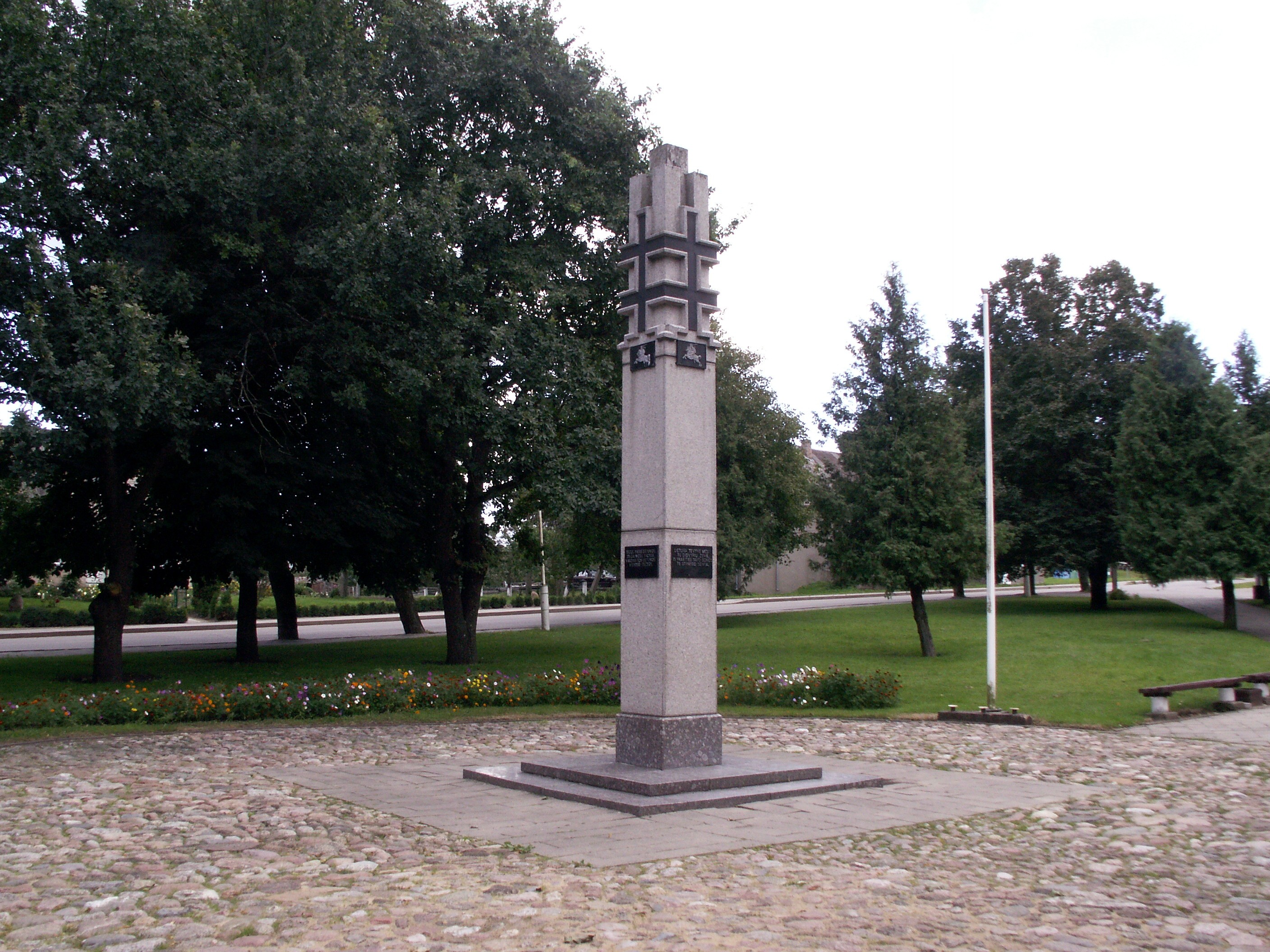 Luokė, Telšių rajonas, Lietuva